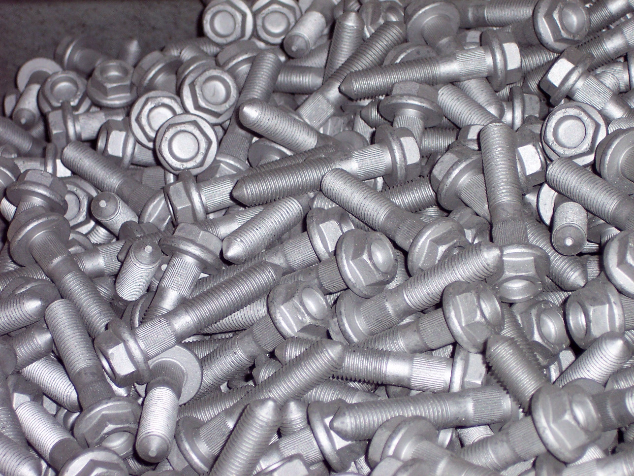 Beschichtete Schrauben mit Zinklamellenüberzug. Das sind hochfeste Schrauben FK 10.9. Das Beschichtungssystem ist Delta Protekt und Delta Seal GZ der Fa. Dörken MKS, und hat kein Cr6+. Wegen Umweltnormen, wie die Altautoverordnung 2000/53 EG, sind Cr6-freie Oberflächen bevorzugt. Diese Schrauben werden in der Automobilindustrie benutzt.